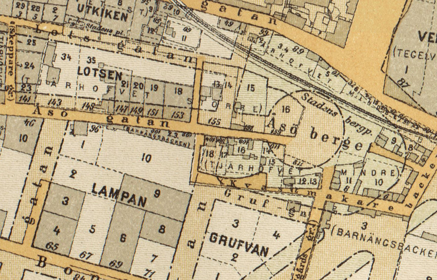 Del av karta över Stockholm visande Åsöberget med omgivning